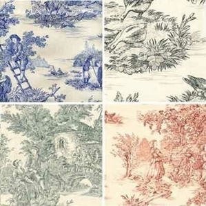 Padronagens de Toile du Jouy